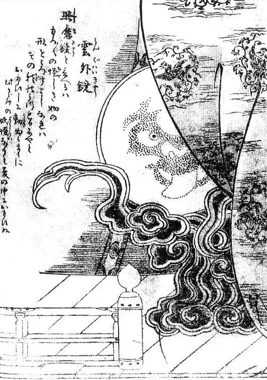 Ungaikyō (雲外鏡) from the Gazu Hyakki Tsurezure Bukuro (百器徒然袋)